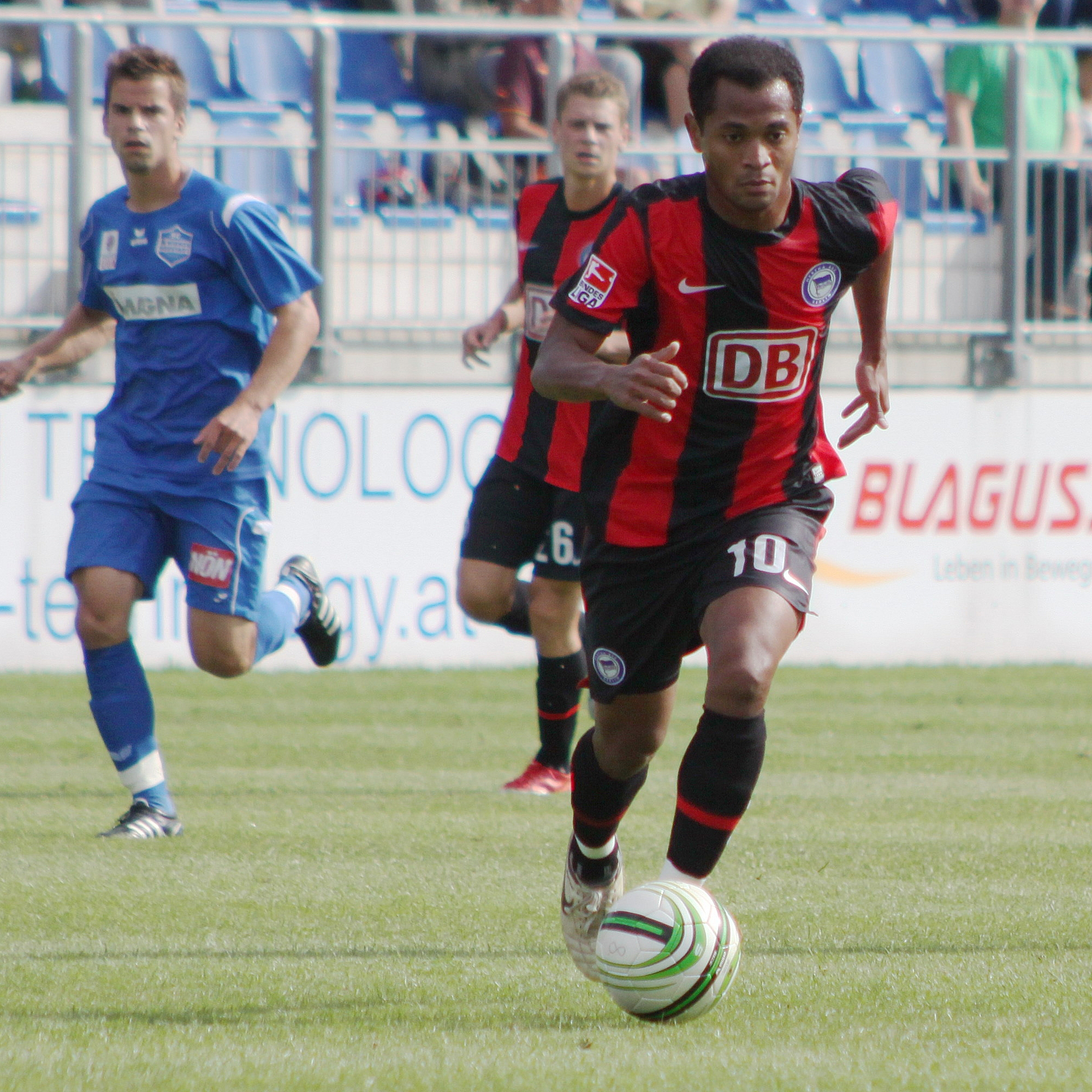 Raffael Caetano de Araújo (Raffael) - Hertha BSC Berlin (3)